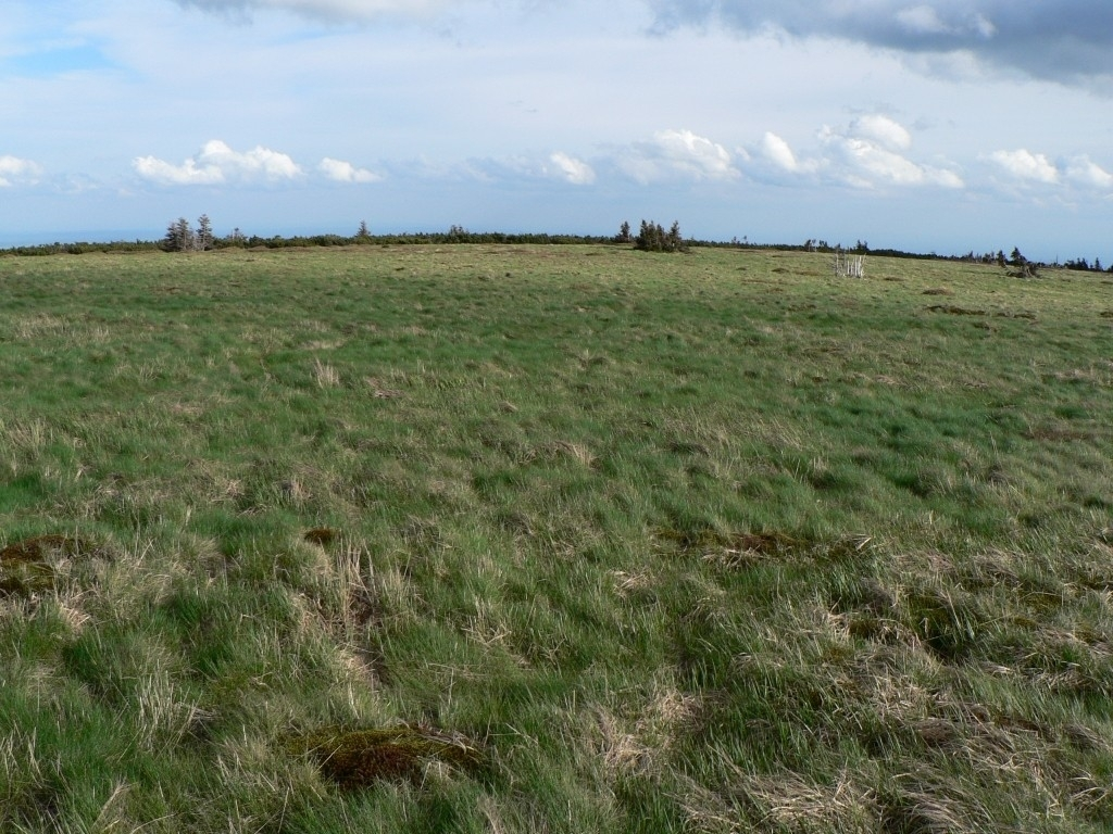 Hole na vrcholu Jeleního hřbetu, Hrubý Jeseník